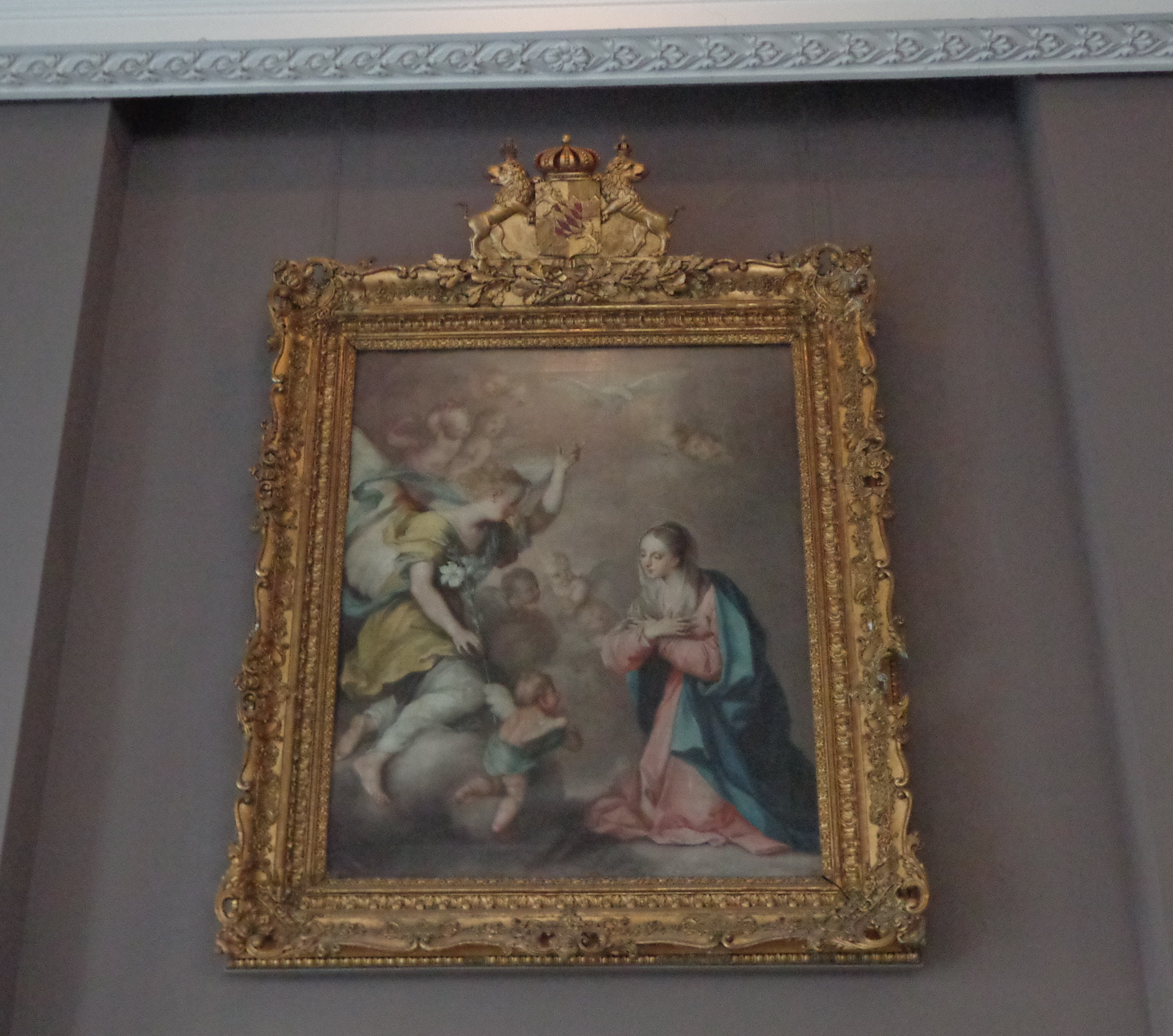 Chapelle de la clinique Sainte-Barbe, construite en 1877 par Eugène Petiti (1809-1883). Tableau L'Annonciation du peintre Ignaz Stern, offert en 1842 par le roi Louis I de Bavière pour décorer la chapelle précédente